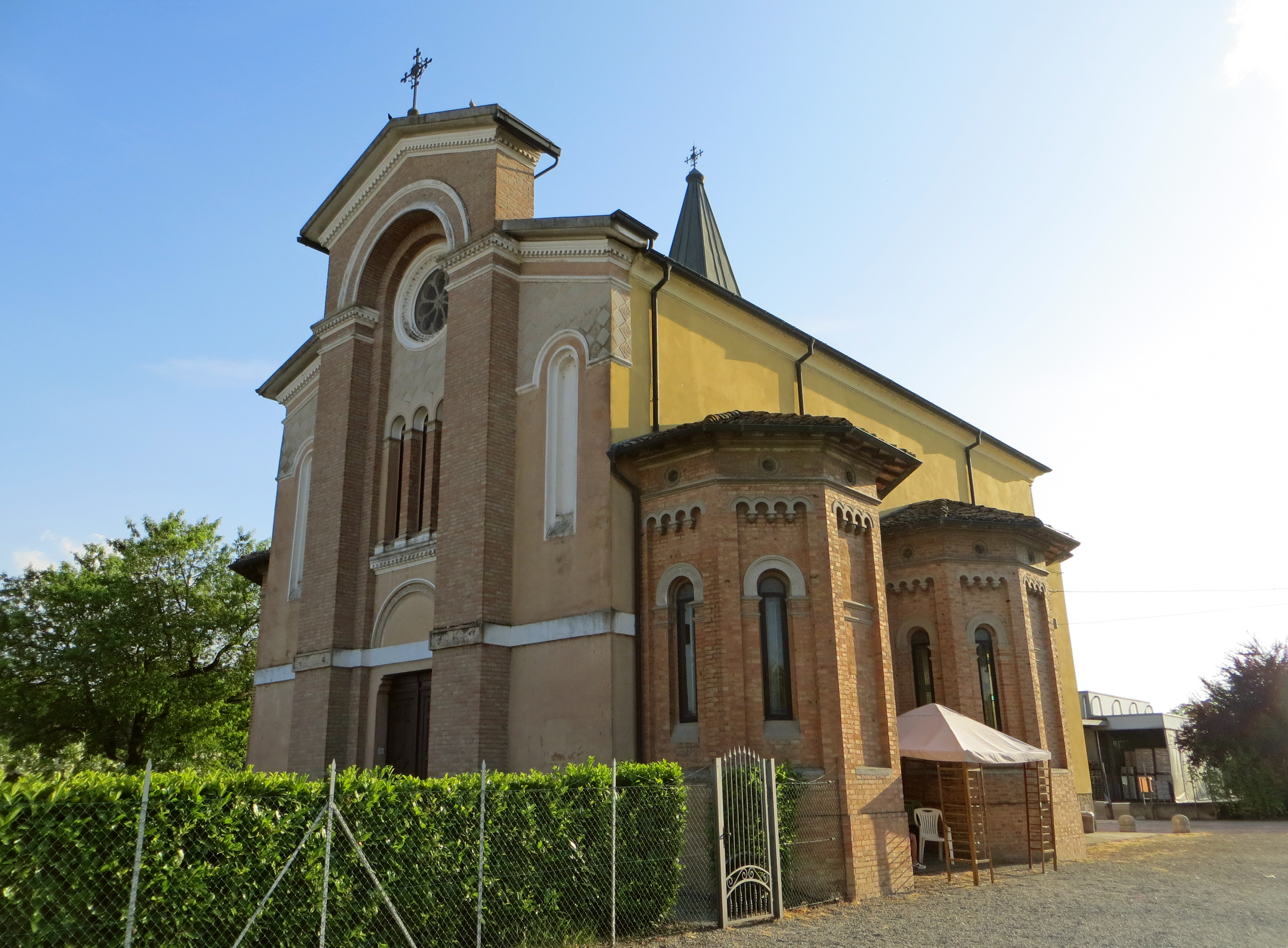 Chiesa di San Pietro (Porporano, Parma) - facciata e lato nord